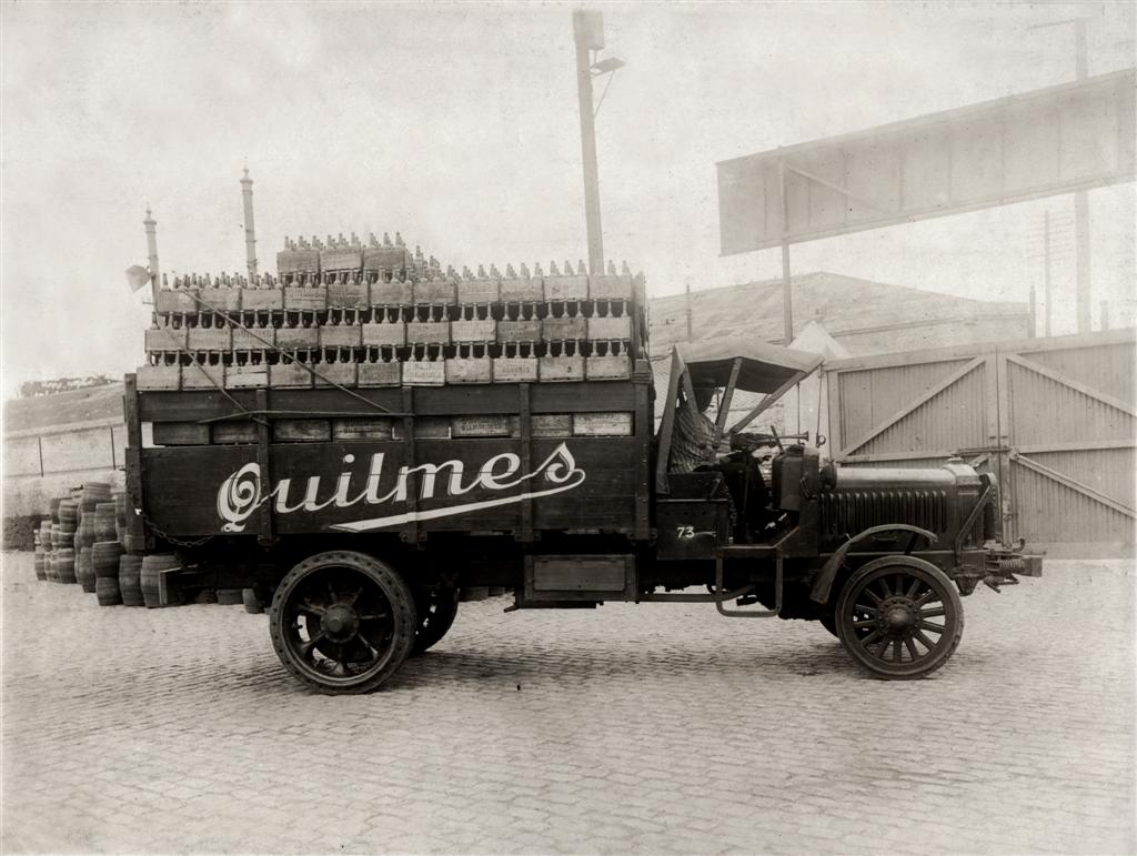 Cerveceria Quilmes en 1910